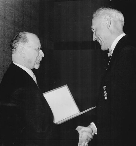 Zentralbild 5.10.1964 15 Jahre DDR - Hohe staatlliche Auszeichnungen verliehen An hervorragende Persönlichkeiten und Kollektive wurden aus Anlaß des 15.Jahrestages der Gründung der DDR am 5.10.1964 auf einem Festakt im neuen Amtssitz des Staatsrates hohe staatliche Auszeichnungen verliehen. UBz: Der Vorsitzende des Staatsrates, Walter Ulbricht, zeichnet Prof. Dr. rer.nat.habil. Werner Gilde aus Halle mit dem Nationalpreis II. Klasse für Wissenschaft und Technik aus. (Junge)